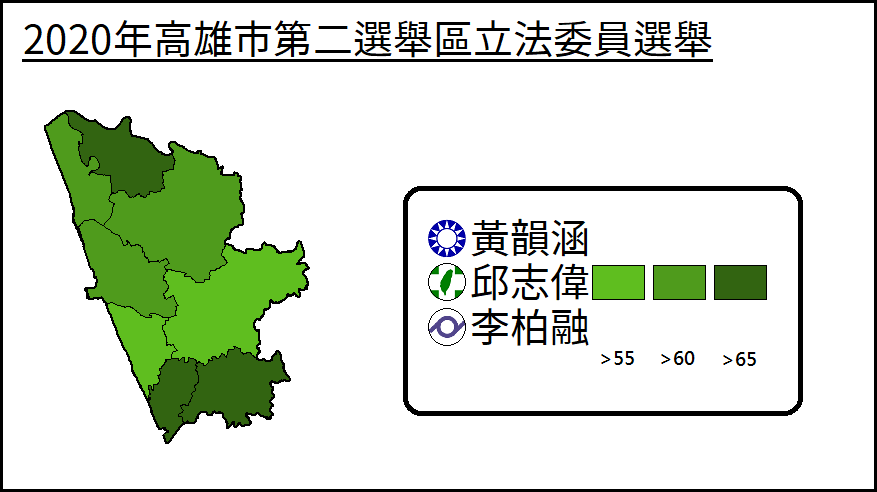 2020年高雄市第二選舉區立法委員選舉得票